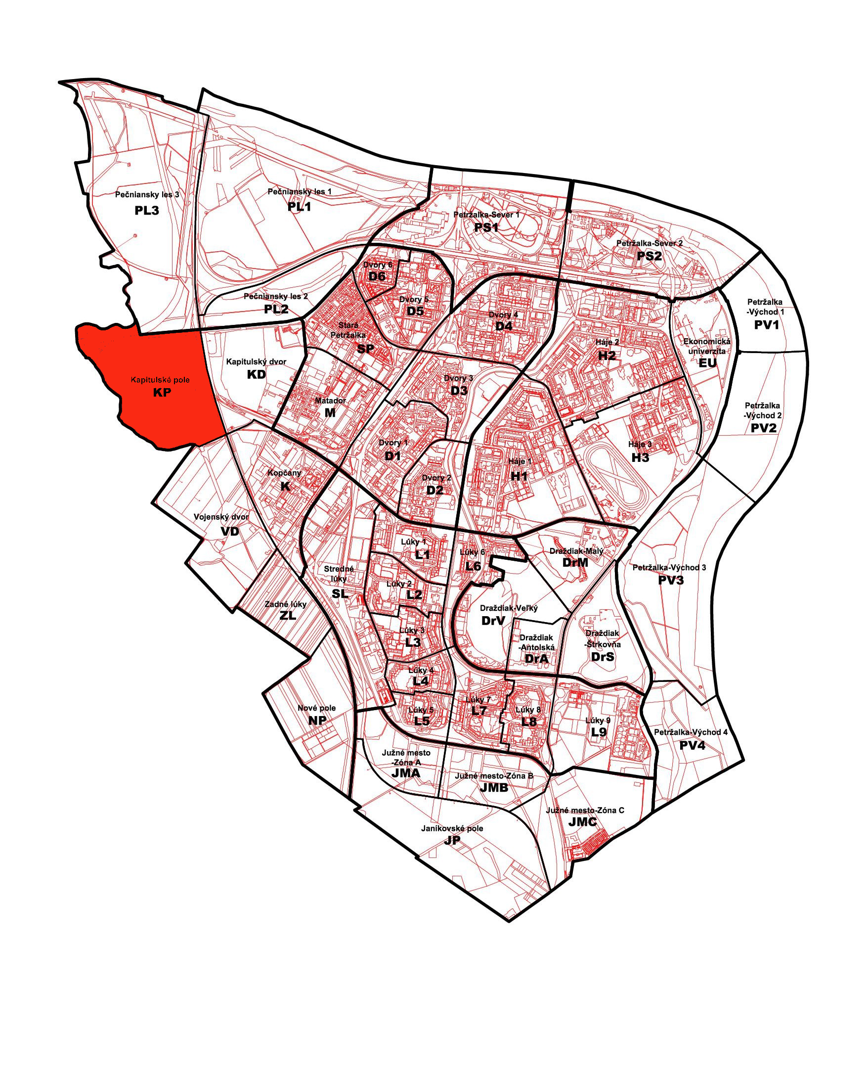 Poloha miestnej časti Petržalky